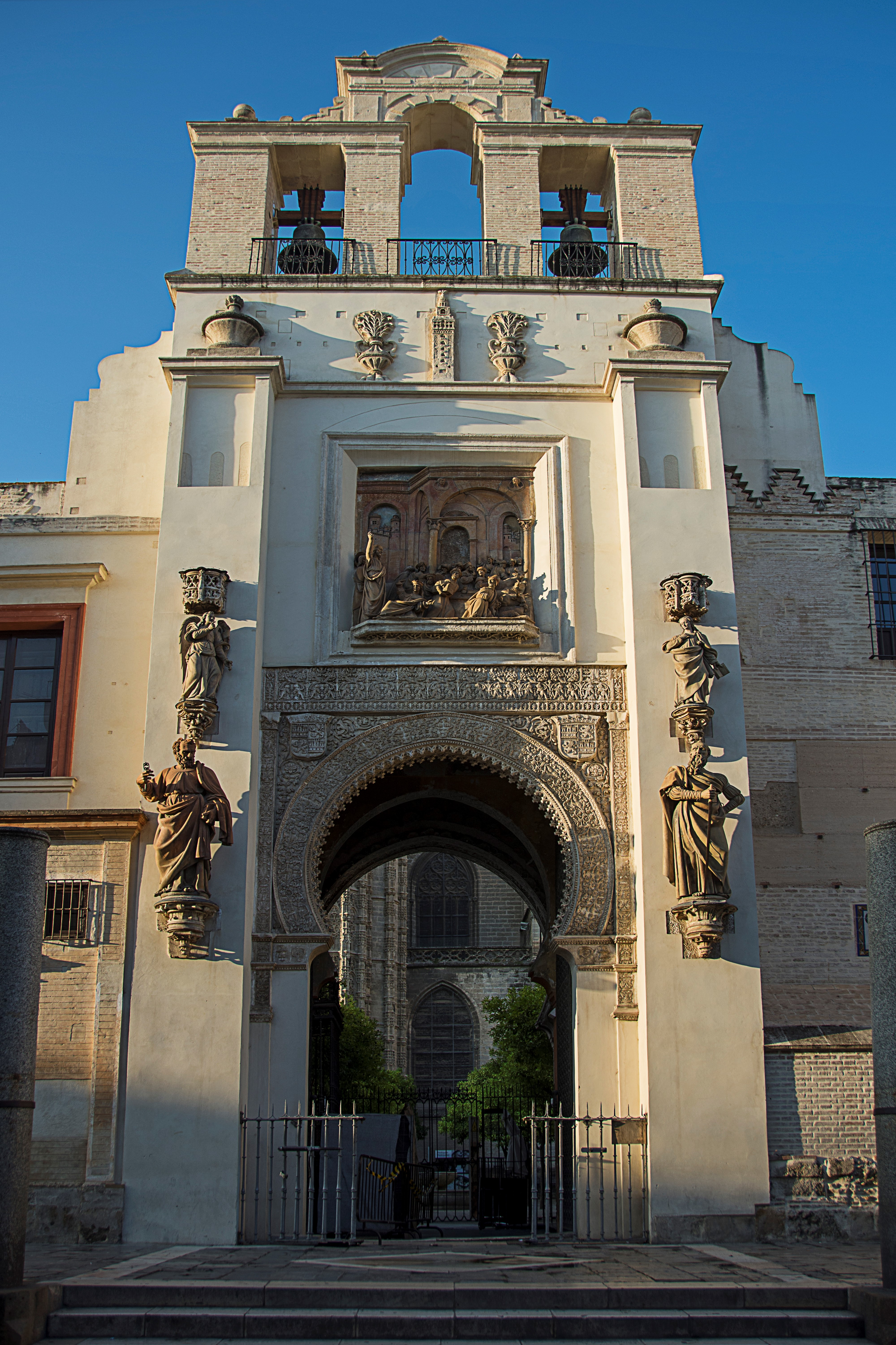 Puerta del Perdón en la fachada norte de la Catedral de Sevilla, Andalucía, España.